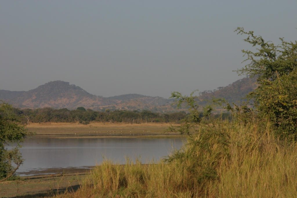 Lake Kazuni, Vwaza